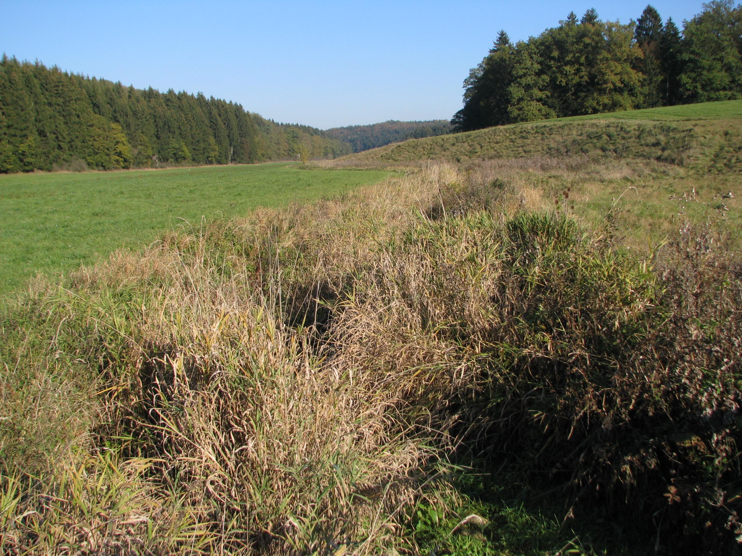 Die Lone bei Bernstadt, LSG „Mittleres Lonetal“. Im gesamten heutigen Lonetal kann man sehen, wie ein in der Erdgeschichte großer Fluss durch Verkarstung nach und nach an immer mehr Stellen trocken fällt.